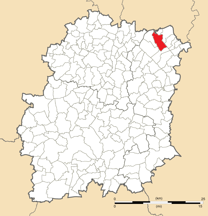 Carte de position de Montgeron en Essonne